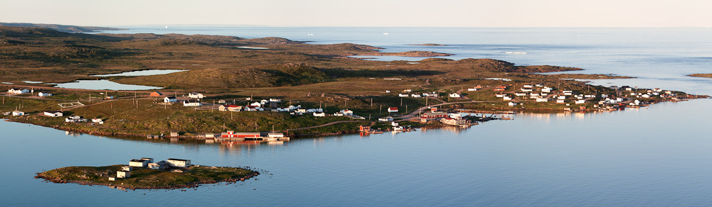 Red Bay - Newfoundland and Labrador